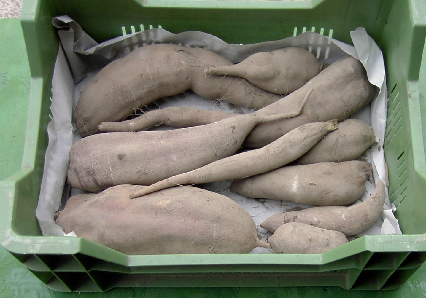 Yaconknollen